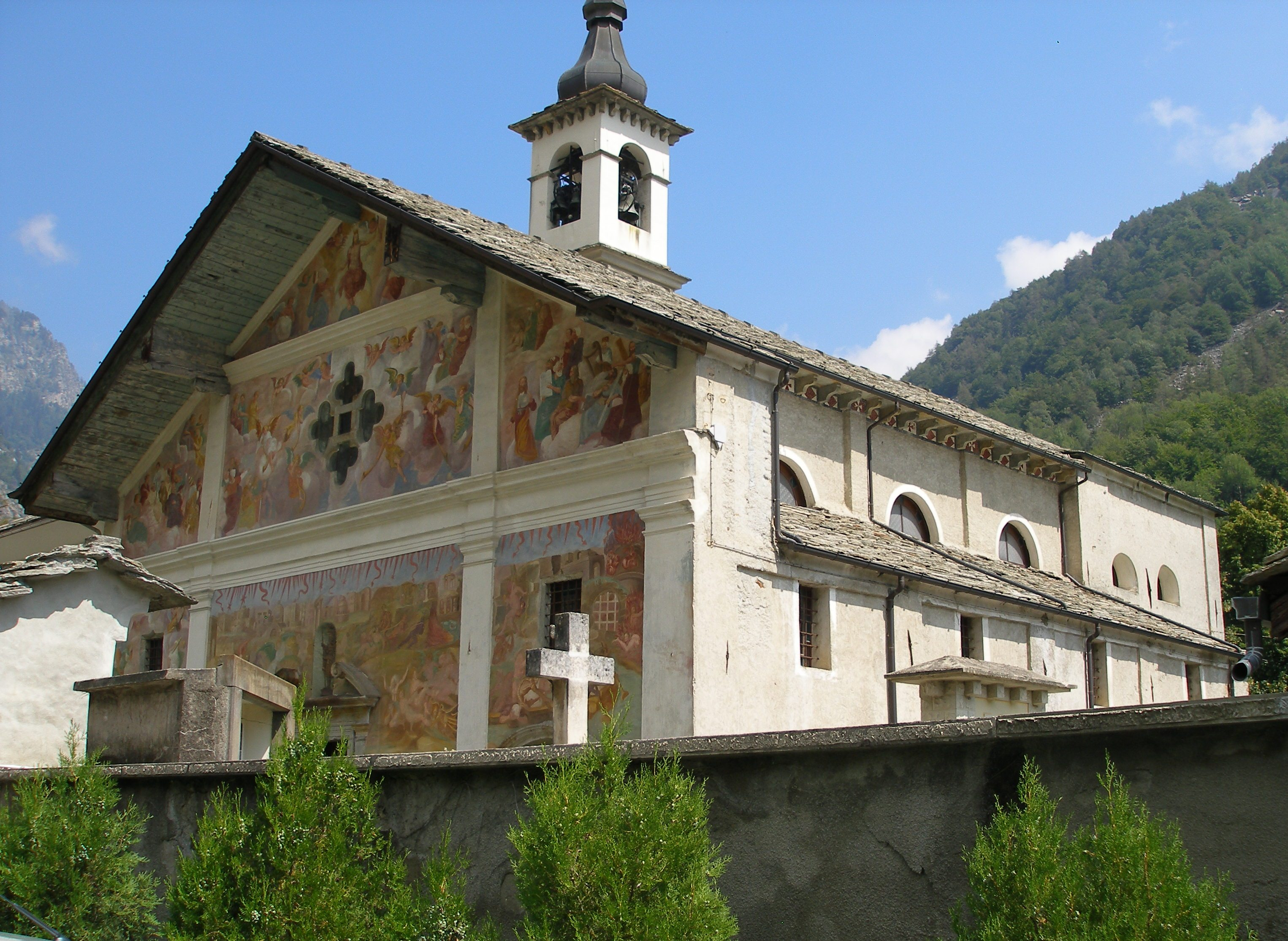 Chiesa - Issime - Val del Lys - Aosta valley - Italy